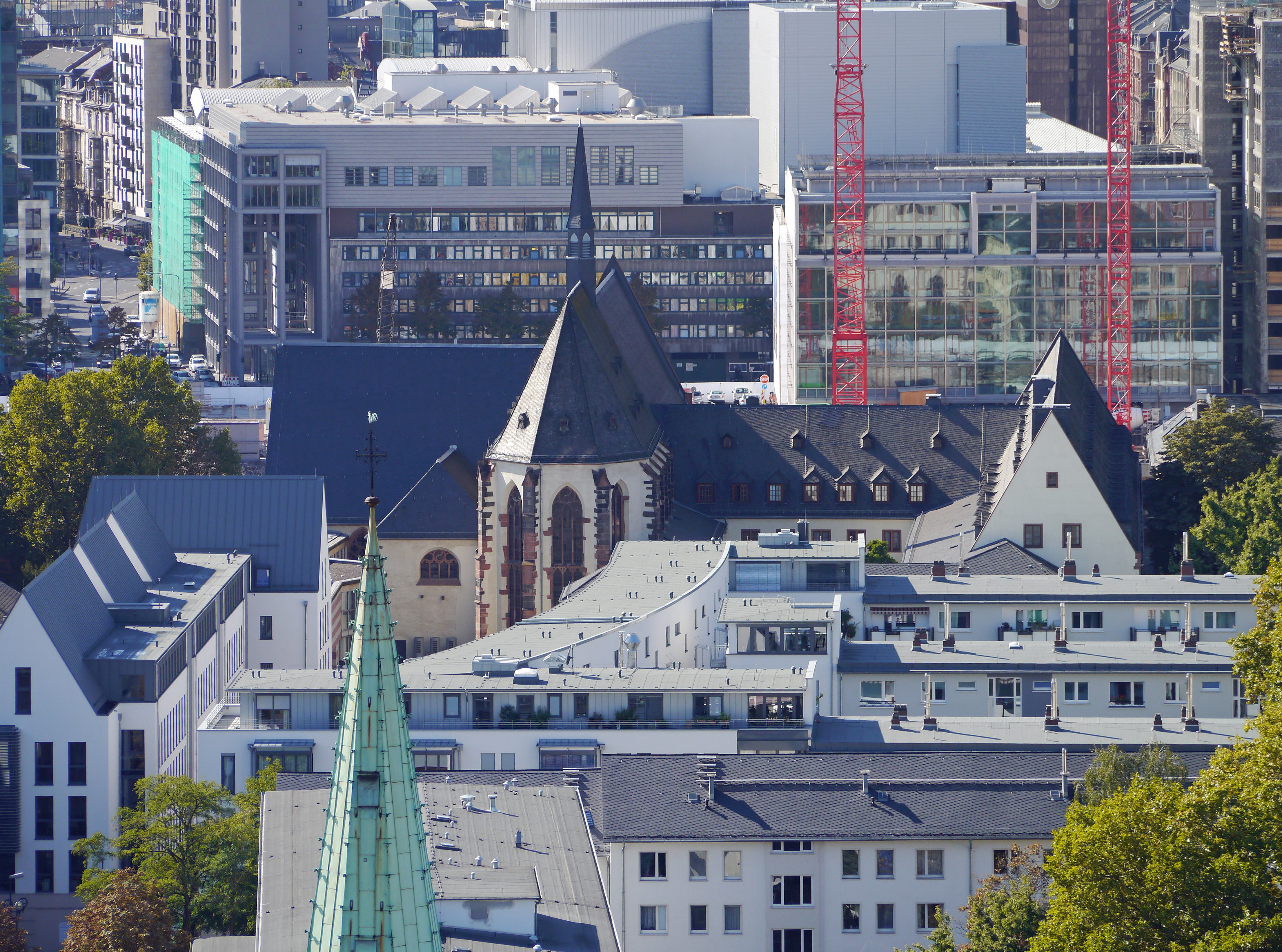 Das Frankfurter Karmeliterkloster mit Klosterkirche in der Altstadt (2012). Blick vom Kaiserdom St. Bartholomäus.